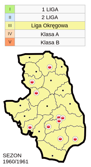 Jagiellonia w sezonie 1960/61- mapa klubów